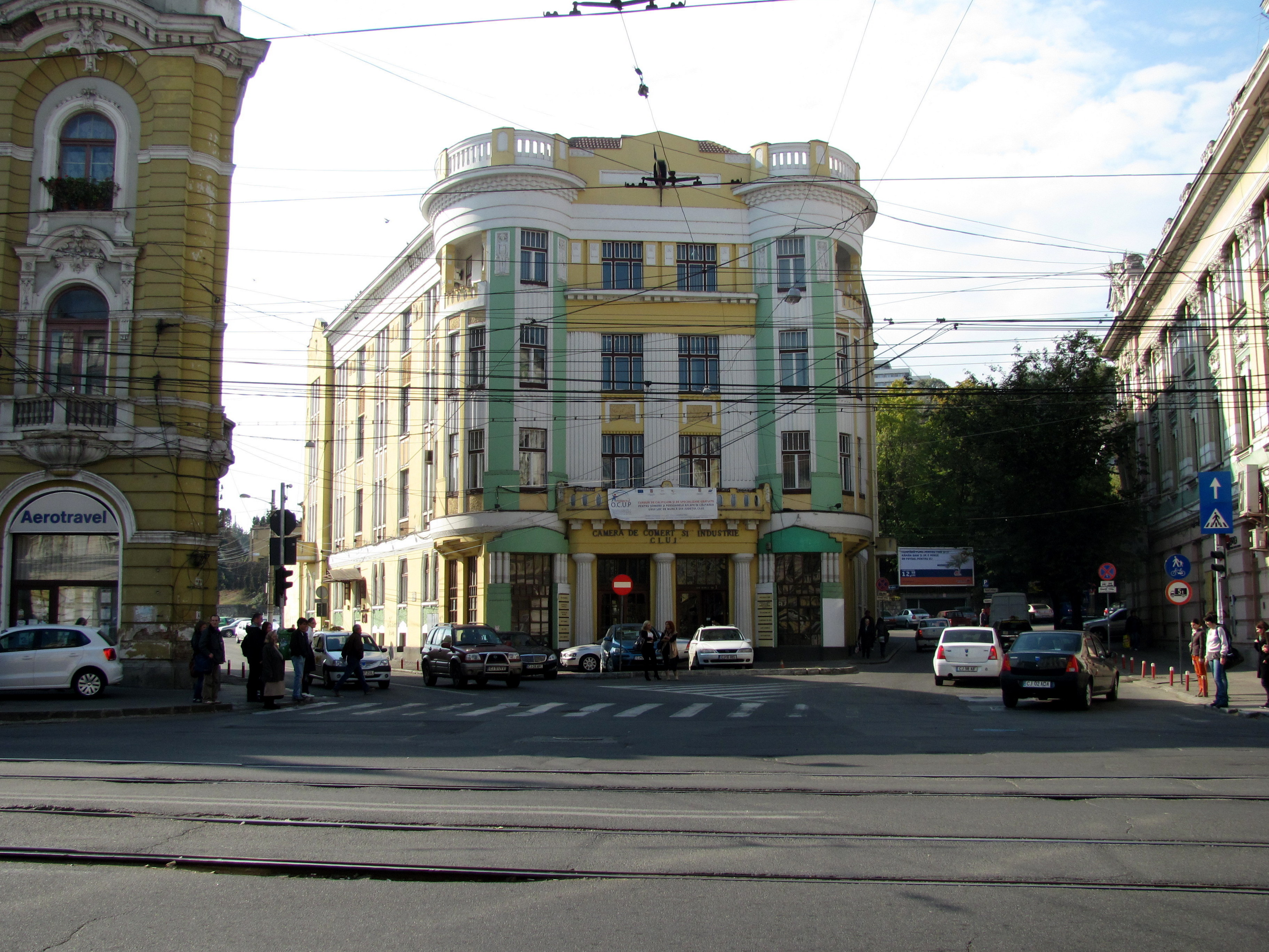 Cluj-Napoca - Str. Horea, Nr.3 - Camera de Comerț și Industrie Cluj